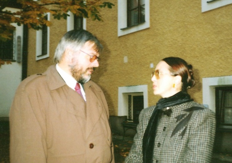 Vladimír Koronthály (1996) s manželkou Markétou